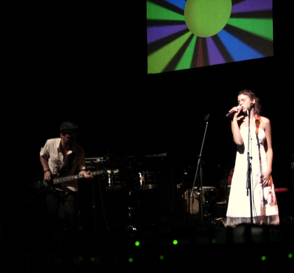 Grupo colombiano Bomba Estéreo